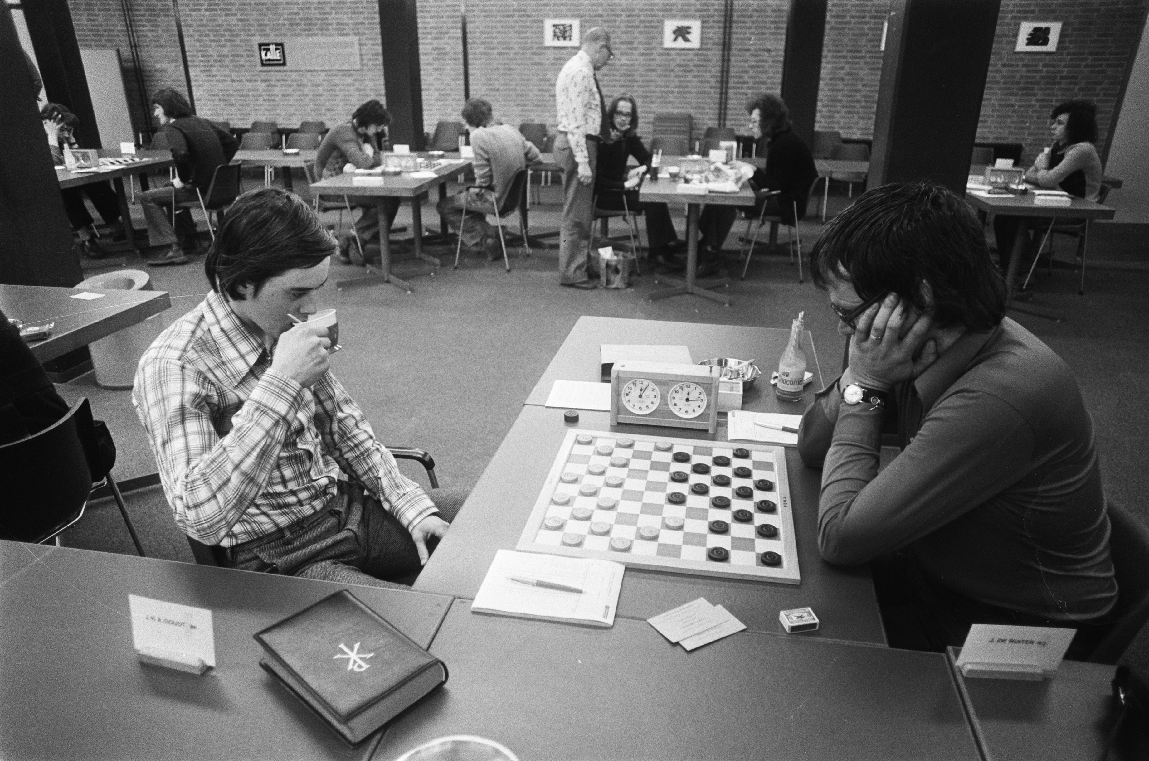 Nederlandse kampioenschap dammen Amsterdam, Jeroen Goudt in zijn partij tegen De Ruiter (r)